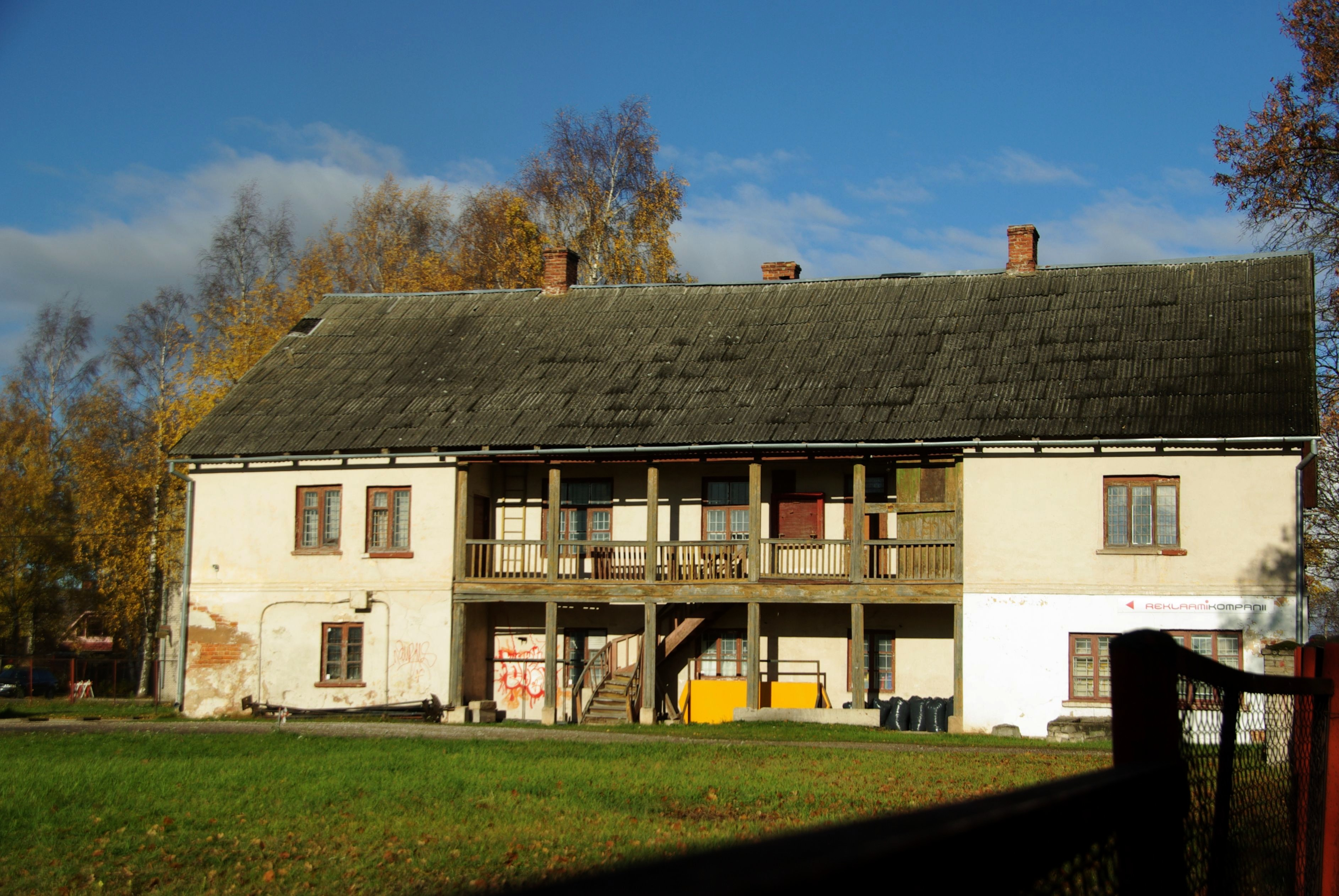 Tartu,Suur Kaar 54